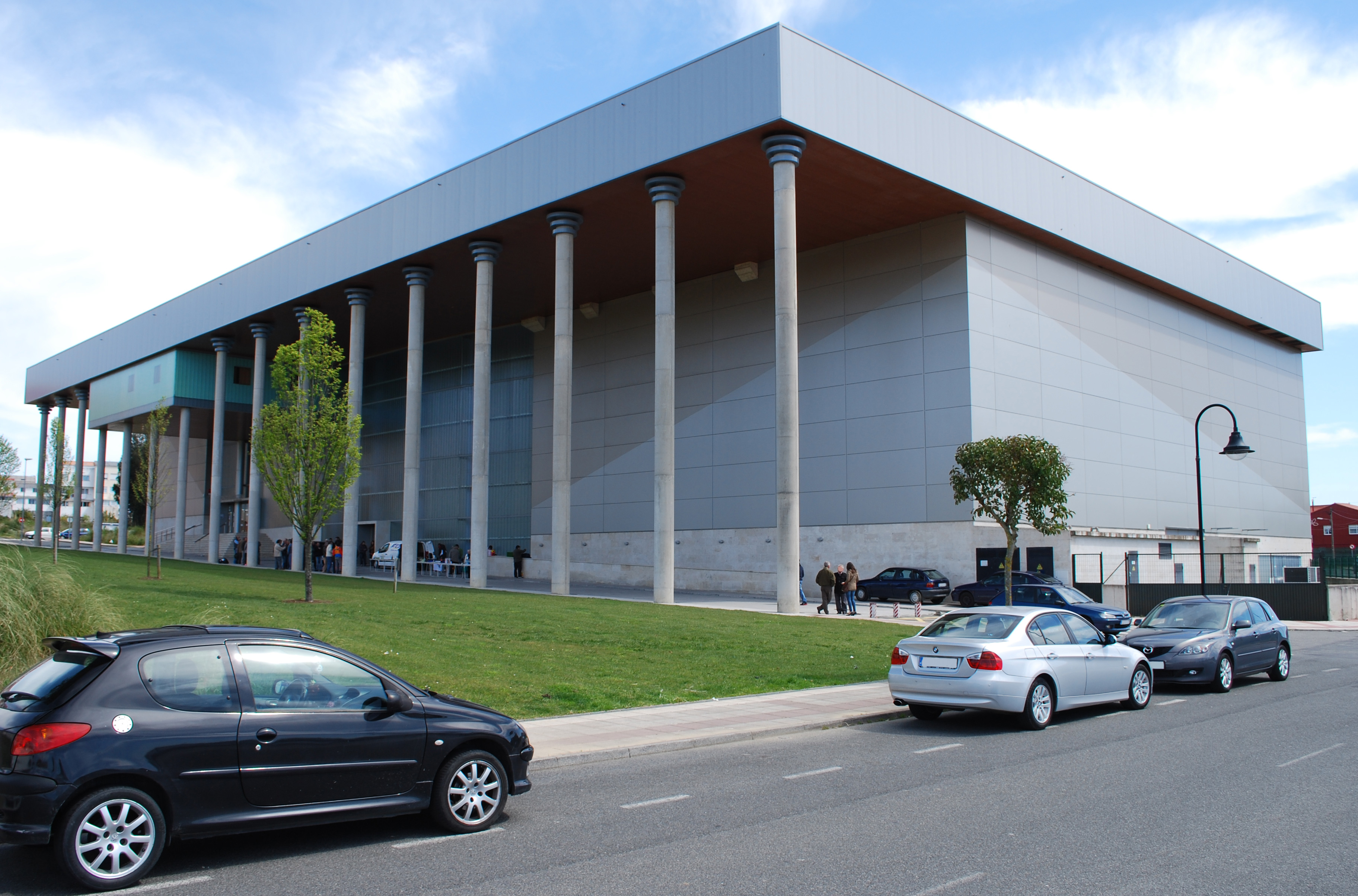 Vista do pazo da cultura de Narón, A Coruña Galiza Spain